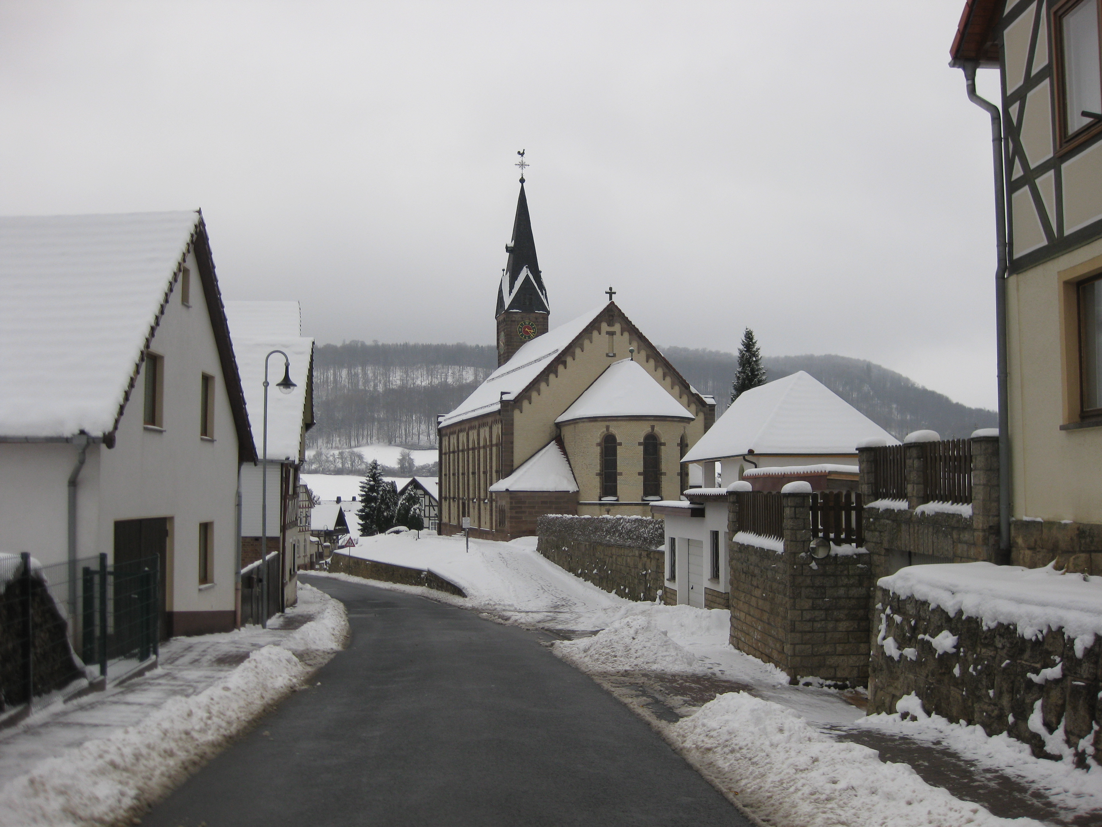 Lutter im Winter (im Hintergrund der Lengenberg)